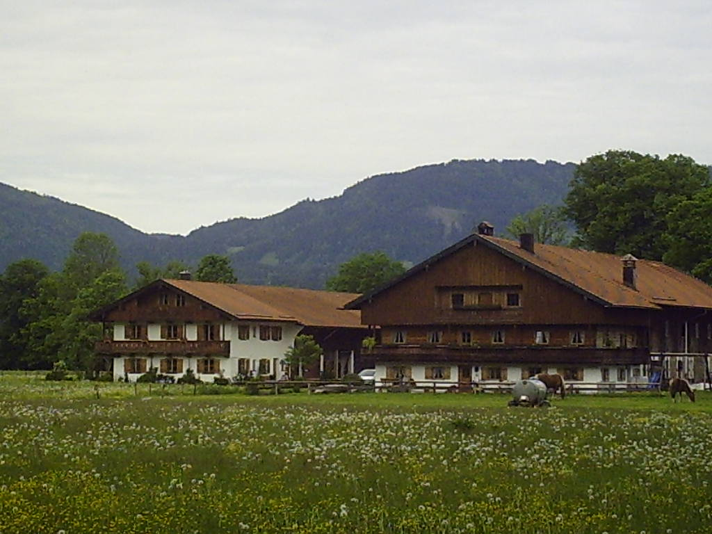 Bauernhaus (rechts im Bild) mit Austragshaus in Pfistern 6